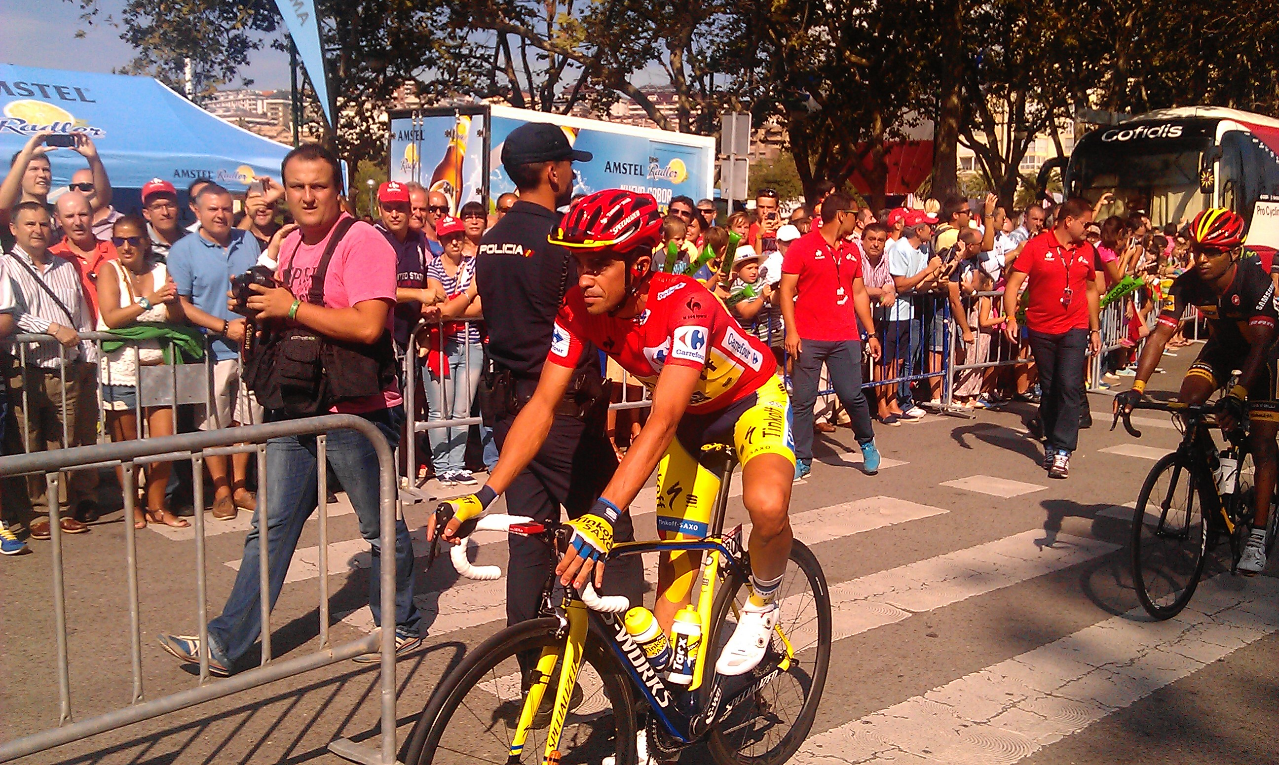 Alberto Contador - Vuelta Ciclista a España 2014